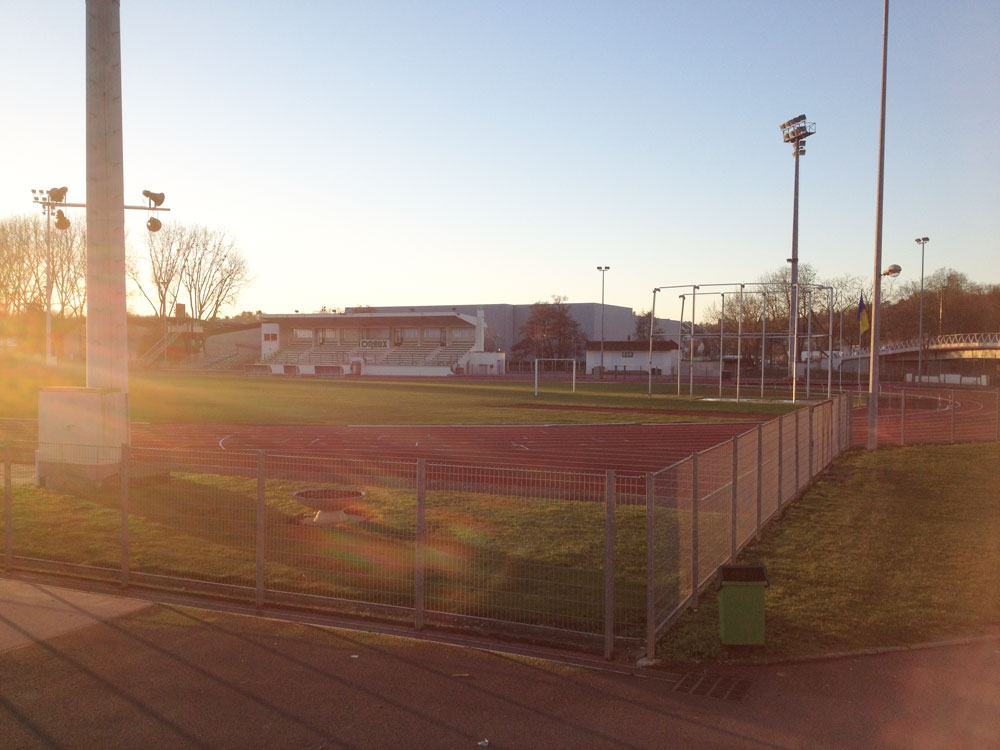 Photographie du Stade Jean-Bruck de Dreux prise le 31 décembre 2014.